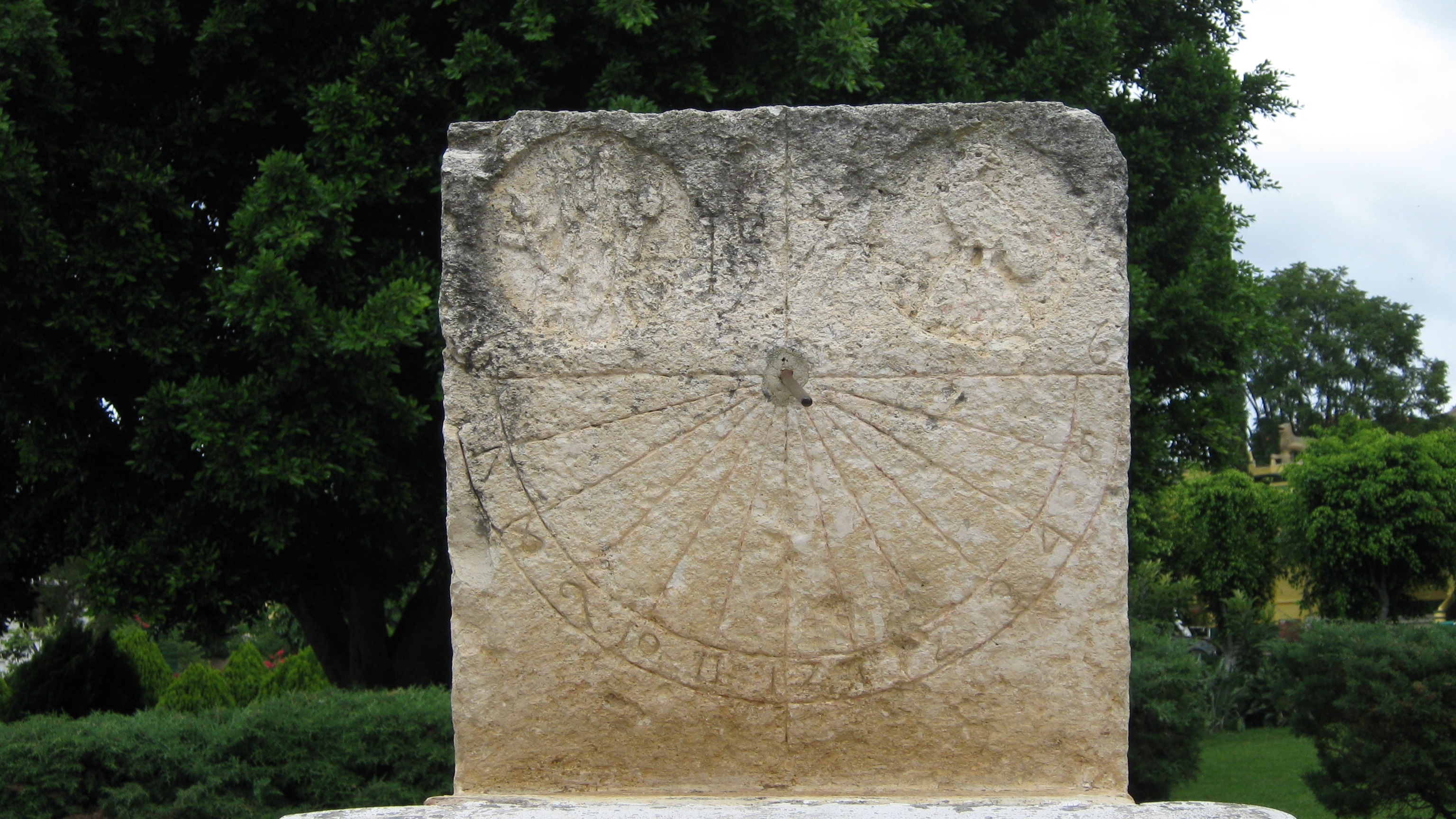 Antiguo reloj de sol en el patio de la iglesia de San Jerónimo Tlacochahuaya.